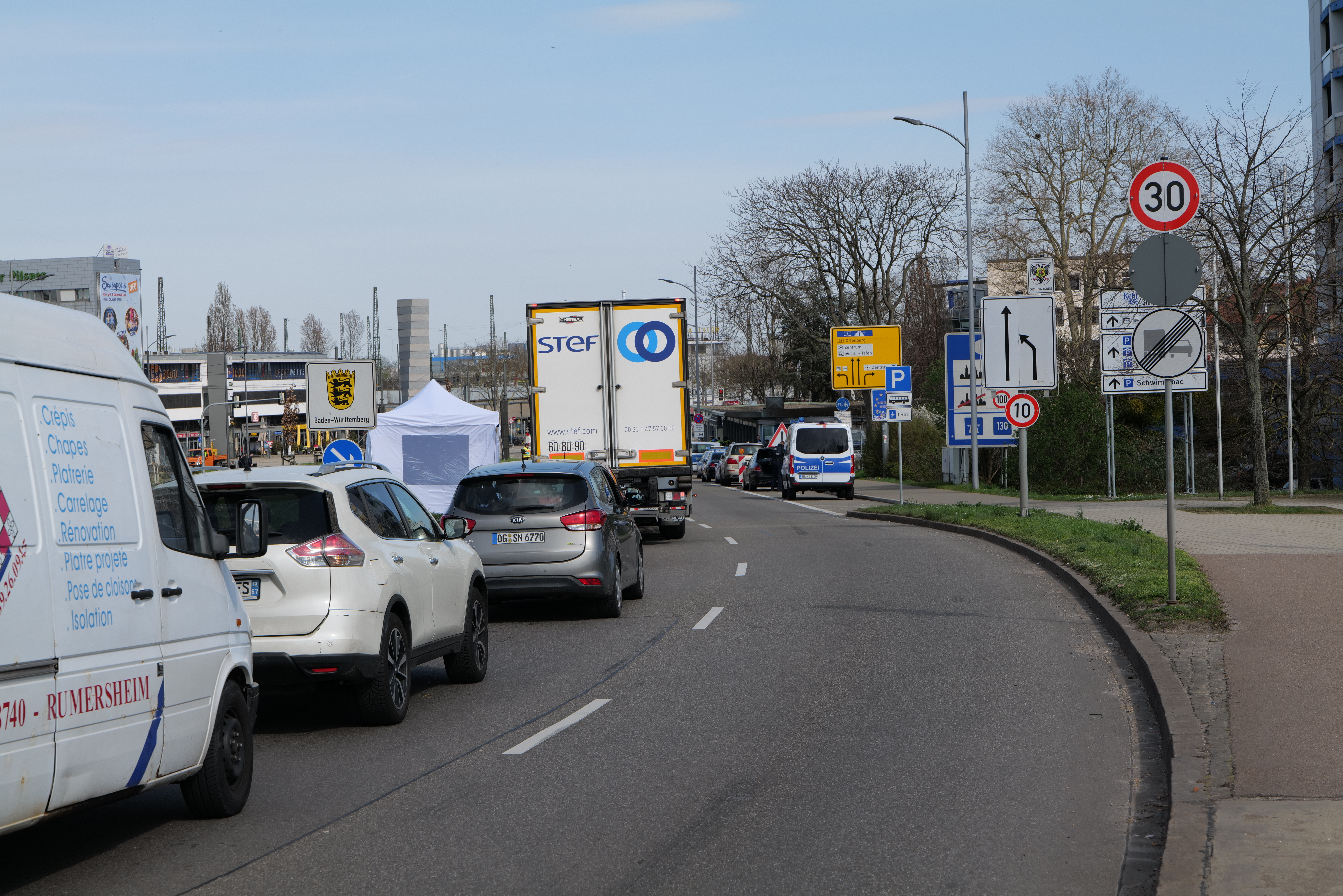 Grenzkontrollen von Ankommenden auf der deutschen Seite der Europabrücke zwischen Straßburg und Kehl am 16. März 2020.